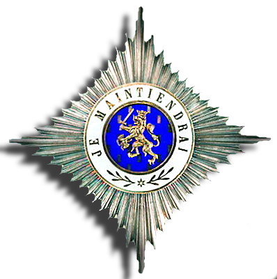 Orania-Nassaun ritarikunnan suurupseerin rintatähti